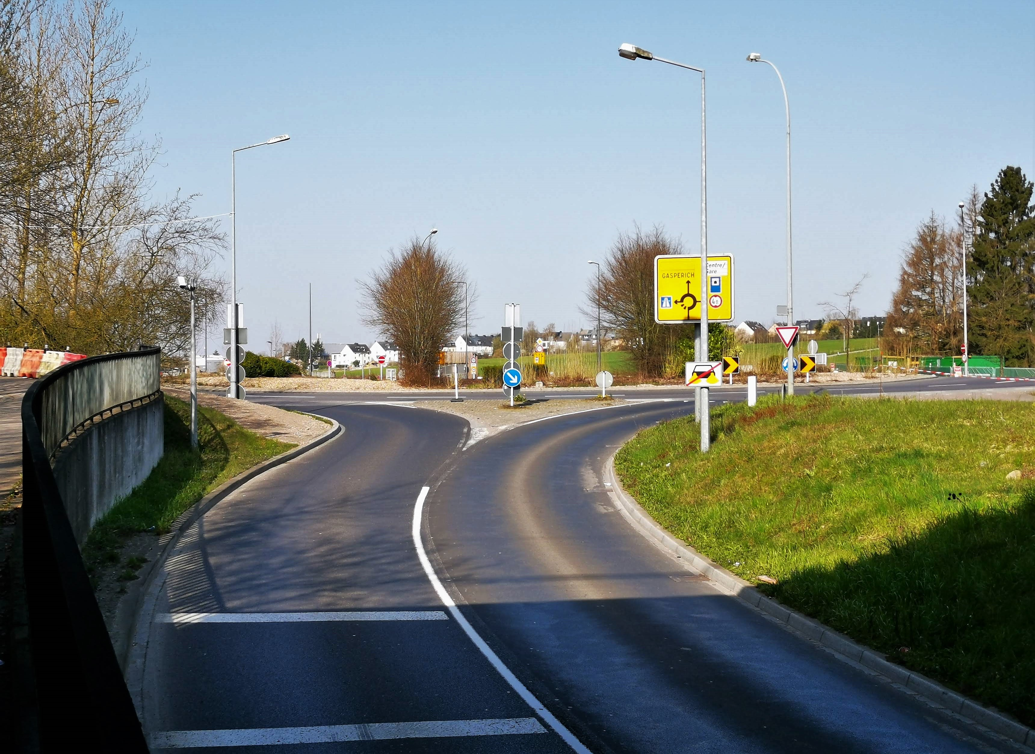 Luxembourg, Tunnel Rangwee. Vue en direction du rond-point Gluck.